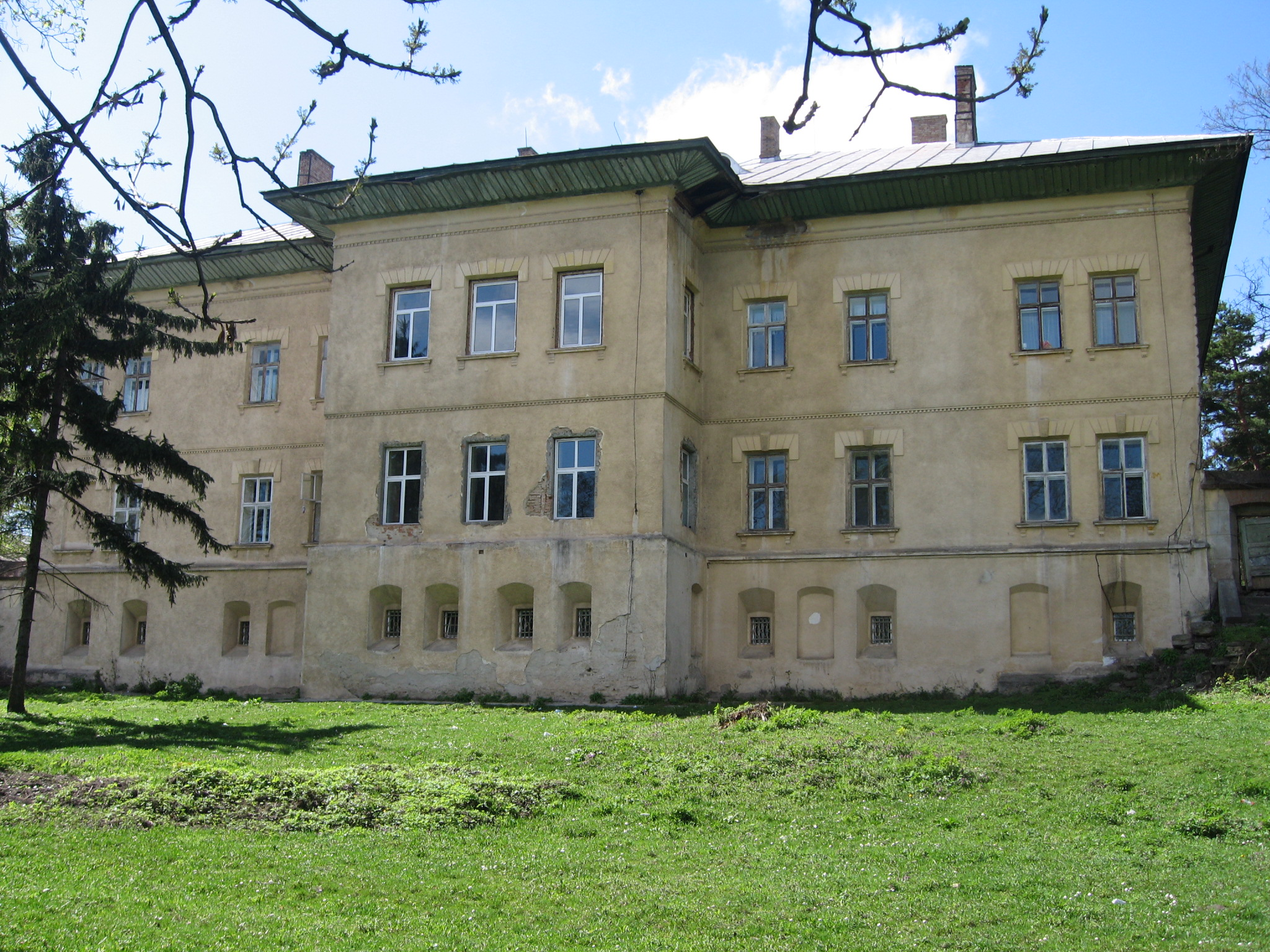 Conacul Cantacuzino-Deleanu din Deleni 01